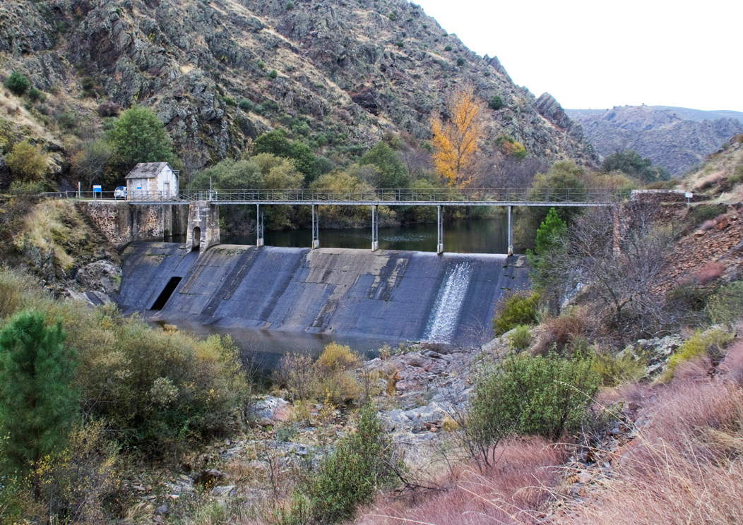 Azud de La Parra 2011